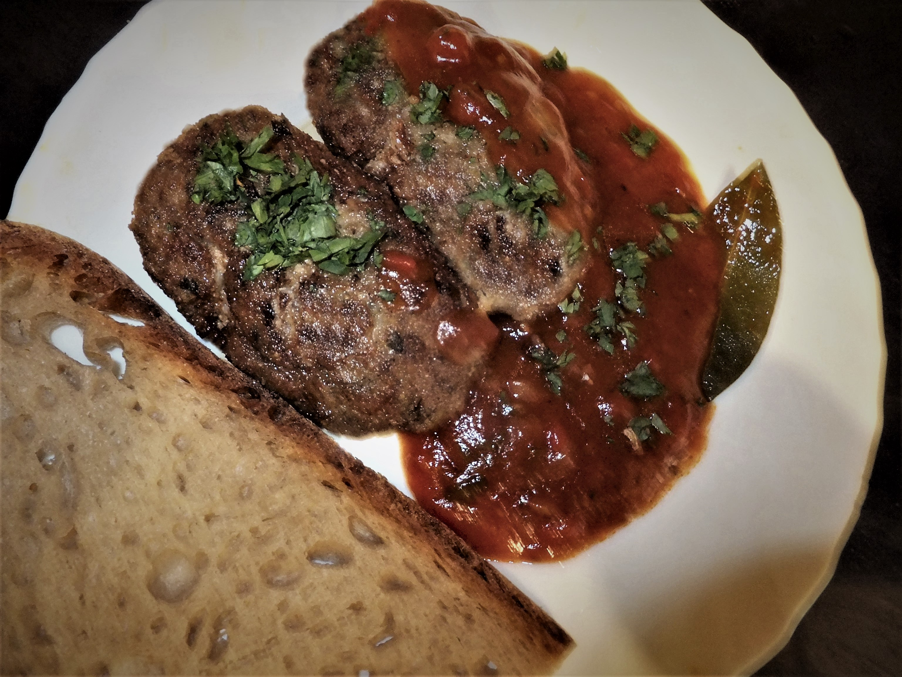 Pârjoale moldovenești (Moldauische Frikadellen)